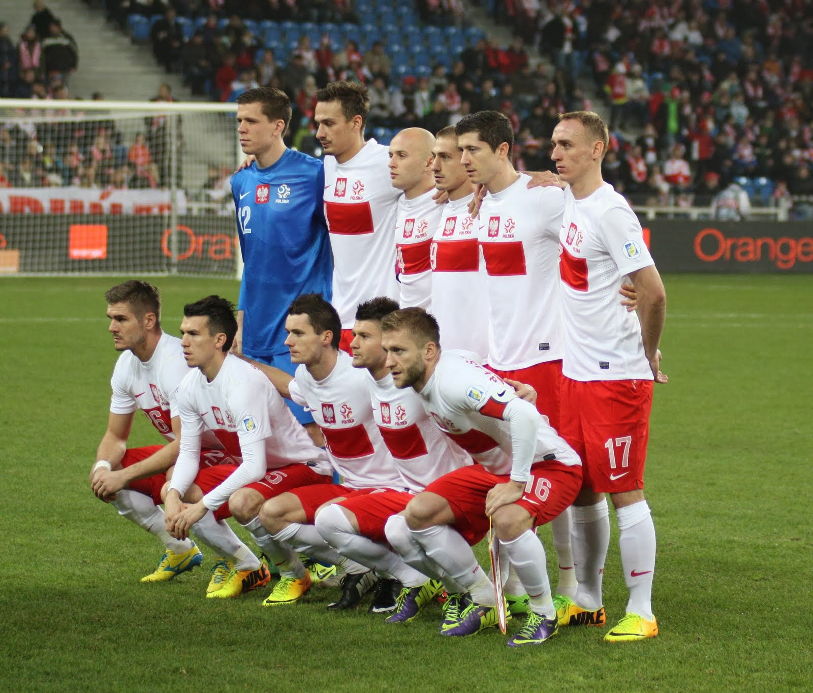 Wyjściowa jedenastka reprezentacji Polski na mecz z Irlandią.